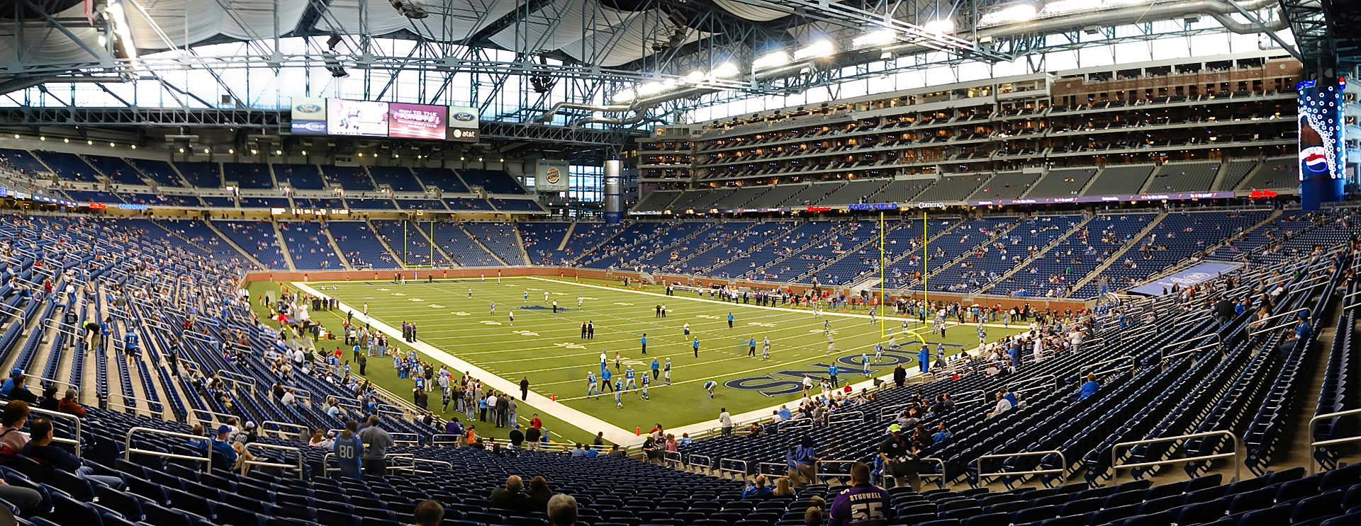 Panorama de l'intérieur du Ford Field de Détroit, Michigan. Photo prise avant un match des Lions de Detroit (2007-09-16).